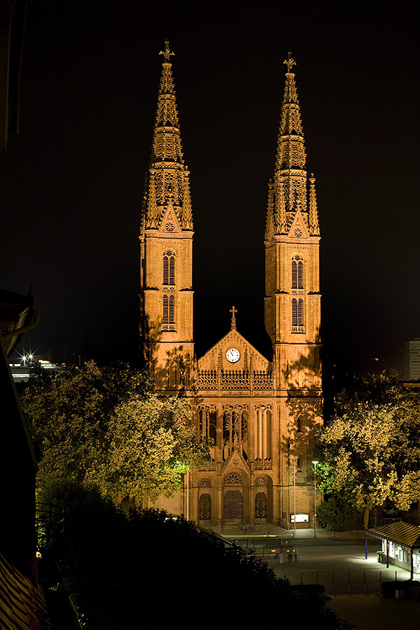 Bonifatiuskirche am Luisenplatz in Wiesbaden